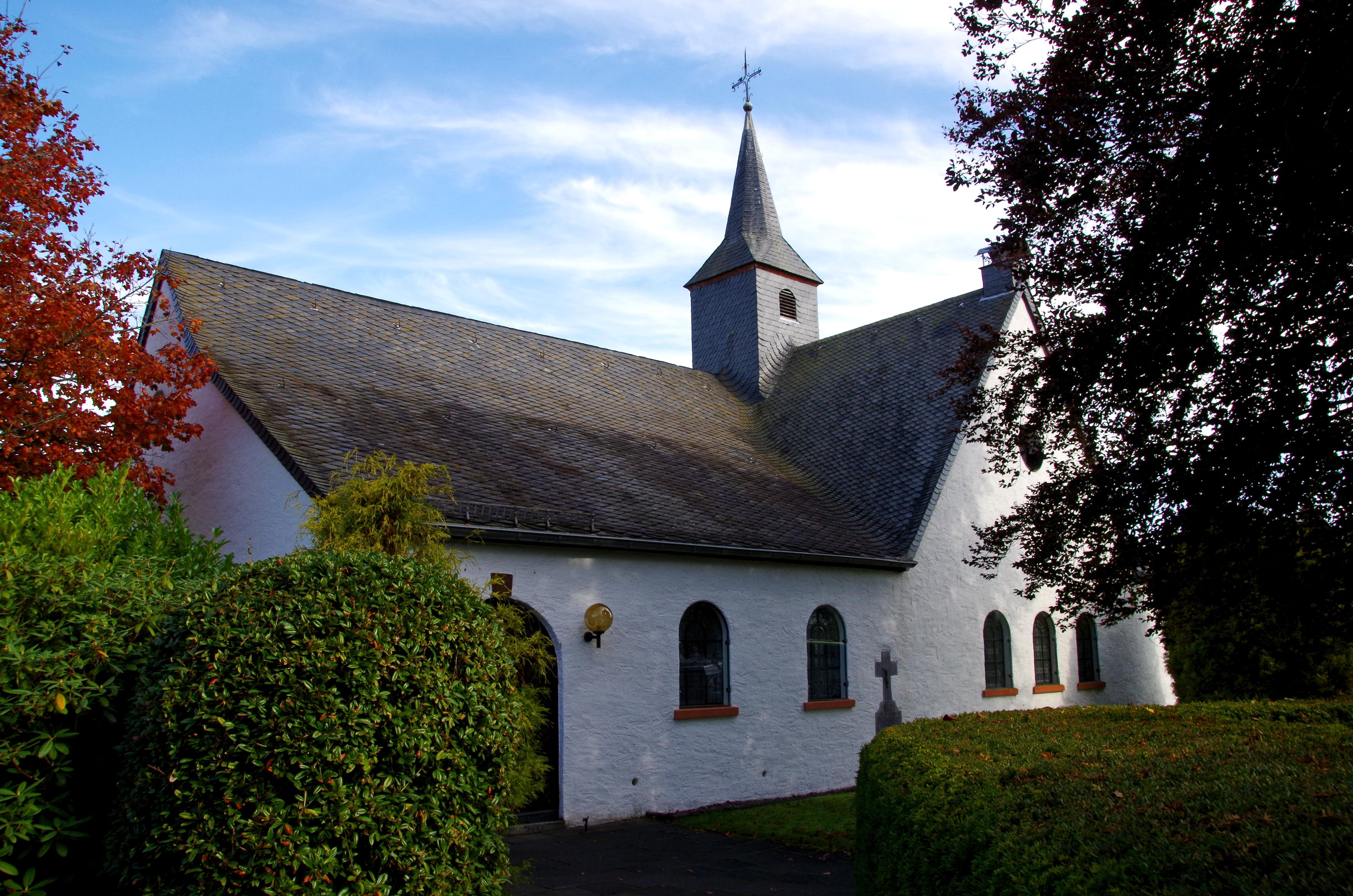 St. Ägidius (Wolfert), Südwestseite